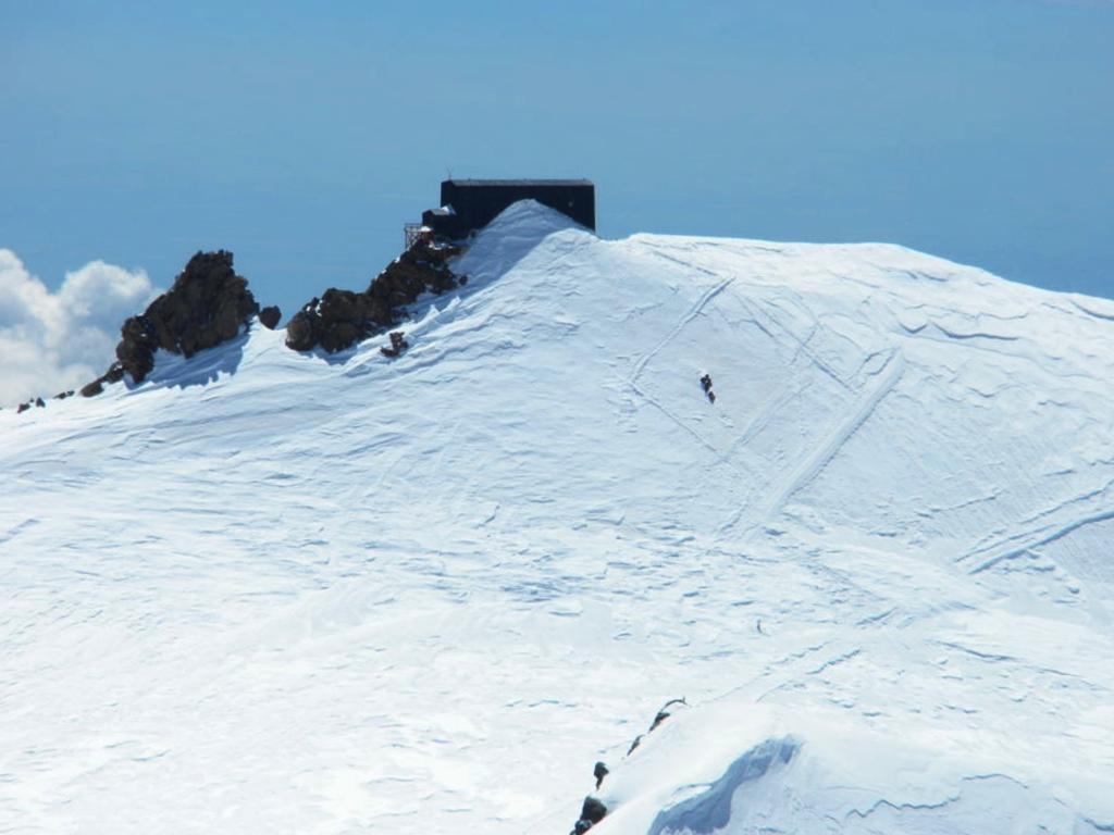 Capanna Regina Margherita (4559 m) auf der Signalkuppe.